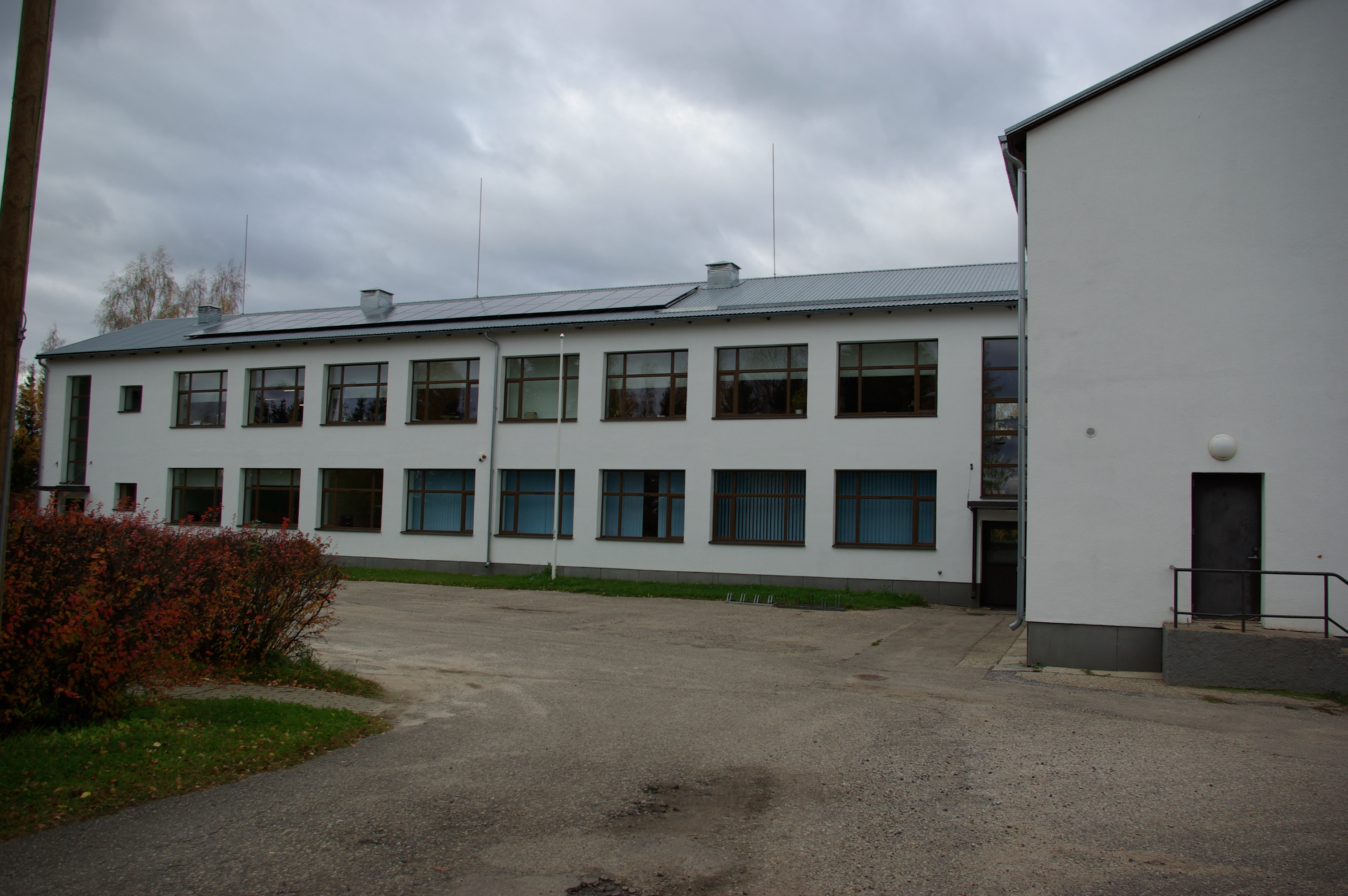 Obinitsa külakeskus